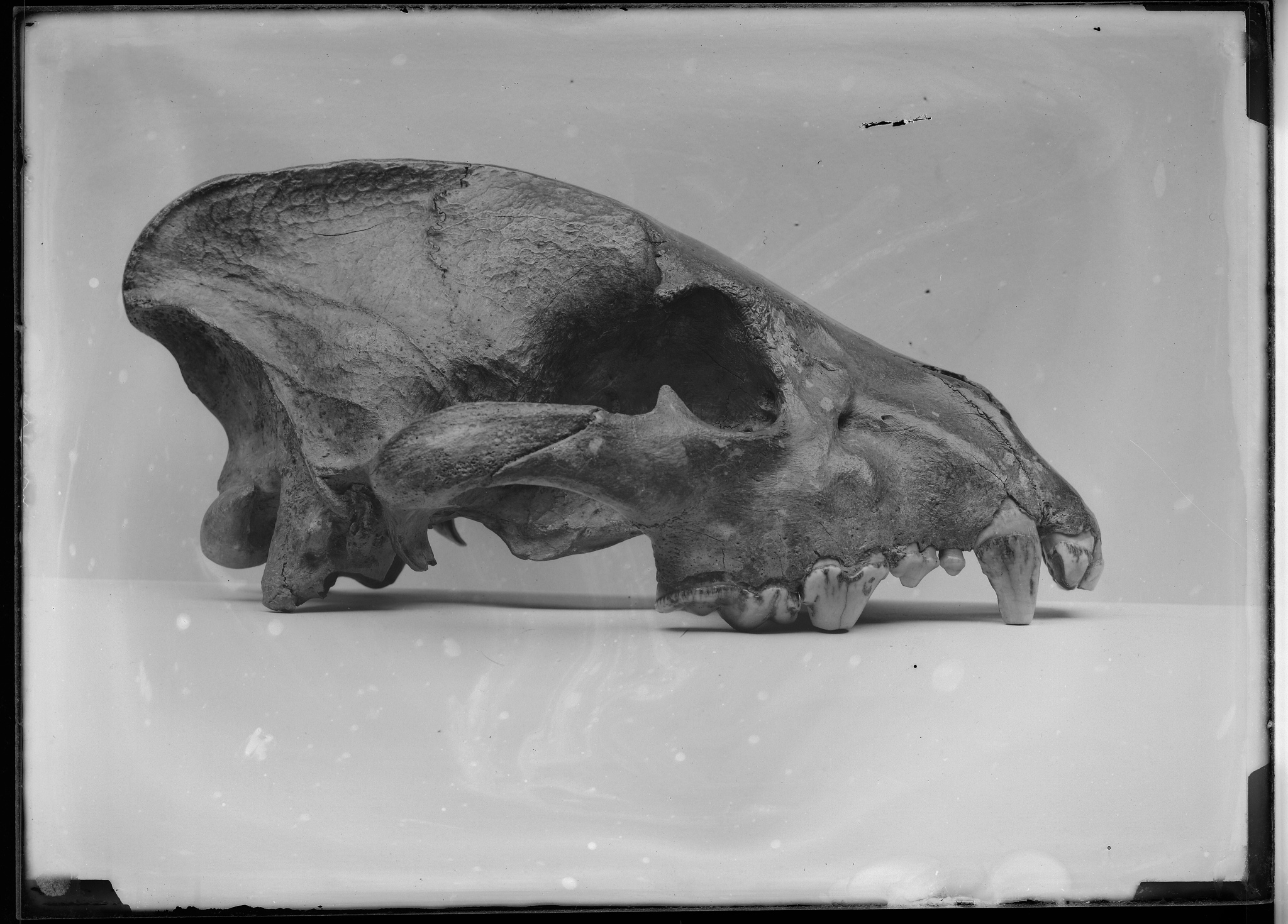 plaque négative au gélatino-bromure d'argent format 13x18cm. inscription manuscrite par Eugène Trutat sur enveloppe : "Crâne d'hyena spelaea"